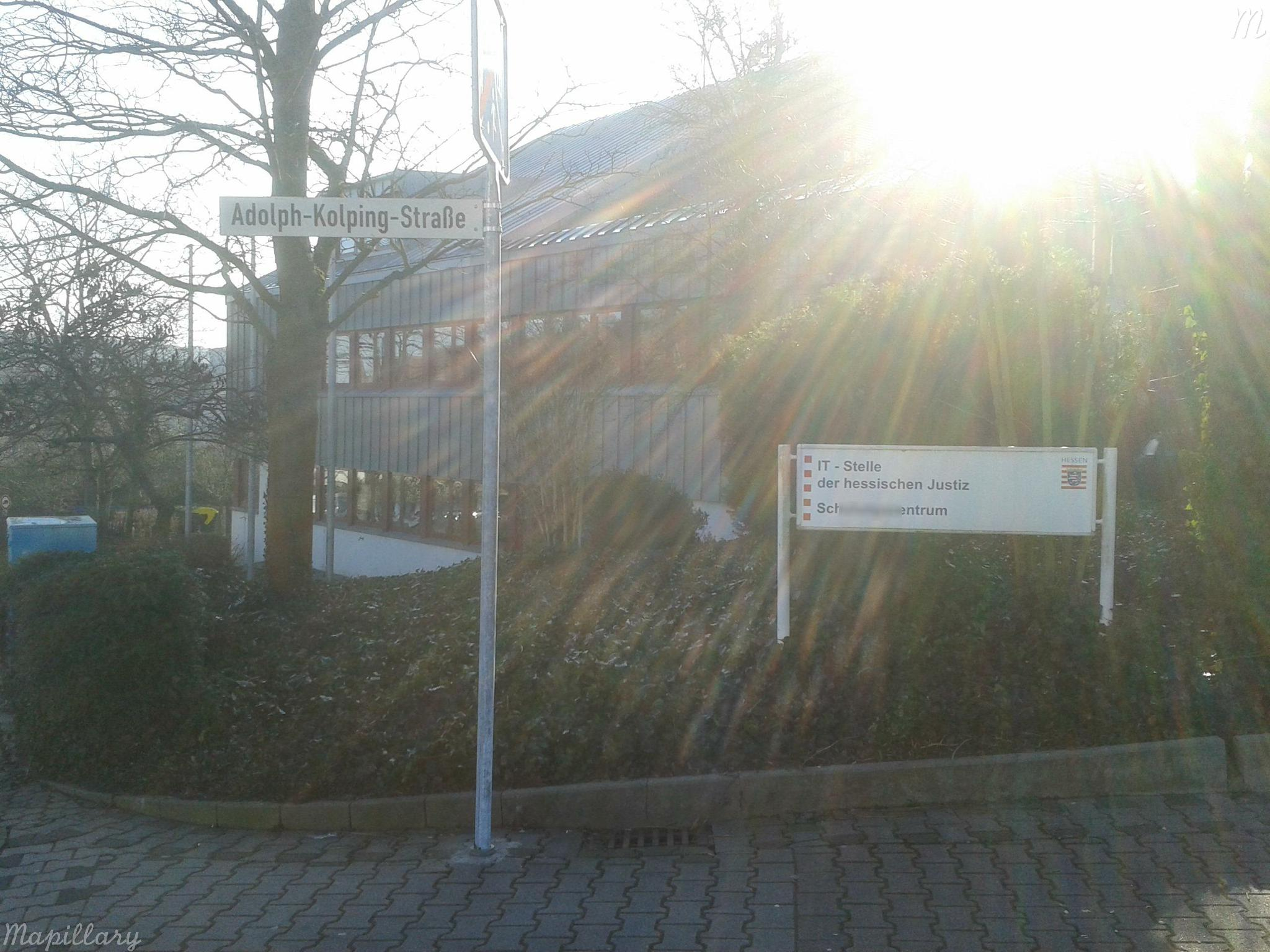 Alte Straße, Bad Vilbel